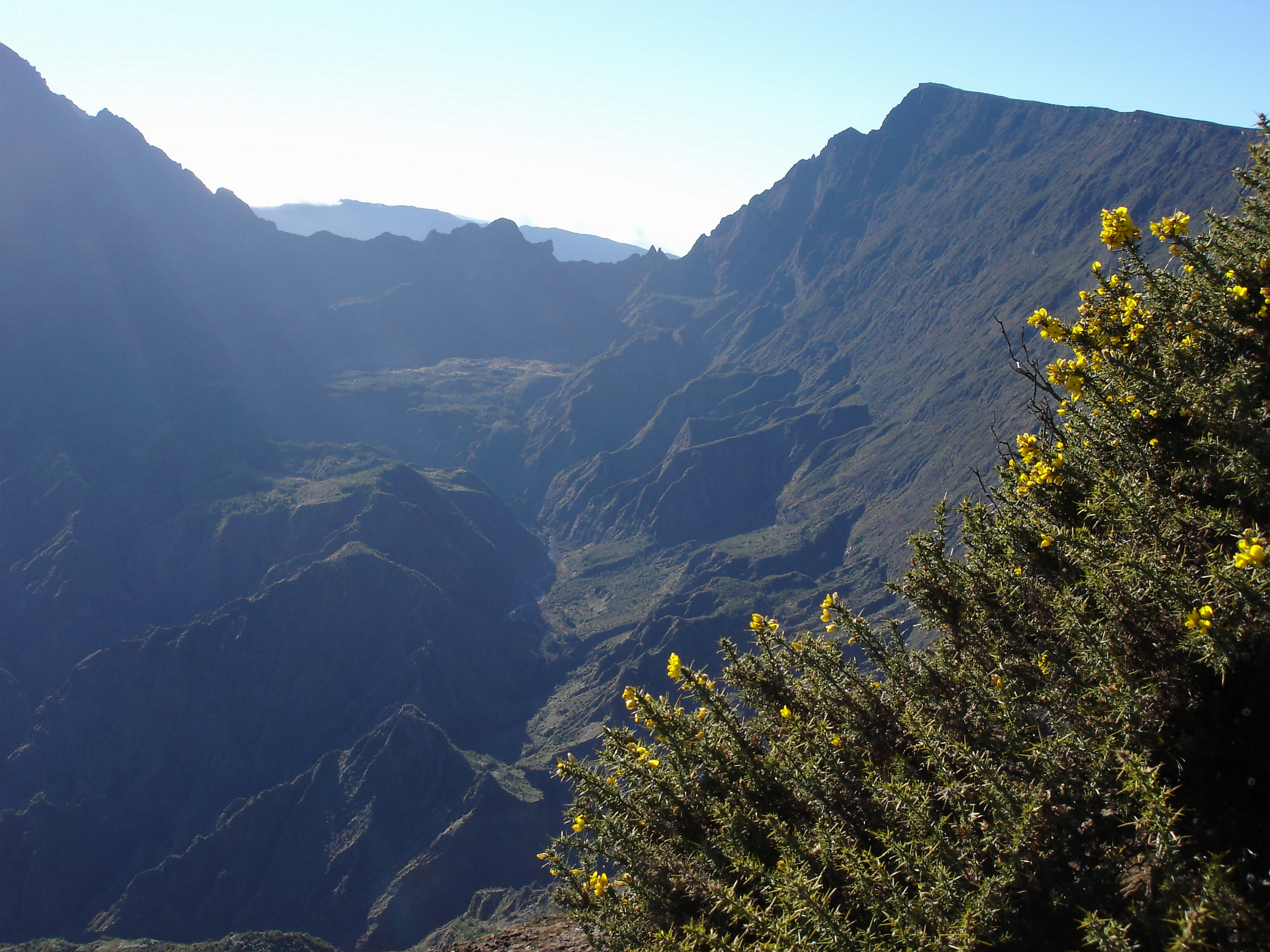 Description: Mafate depuis le Maïdo, avec les Ajoncs épineux, november 2004, La Réunion Source: Bouba